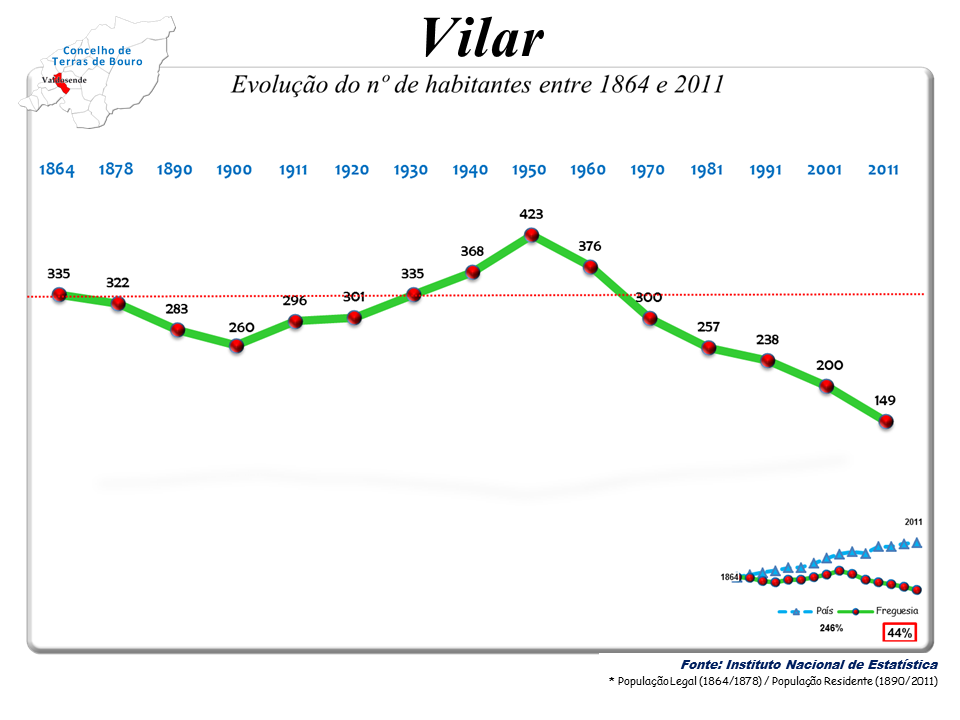 Censos 1864/2011